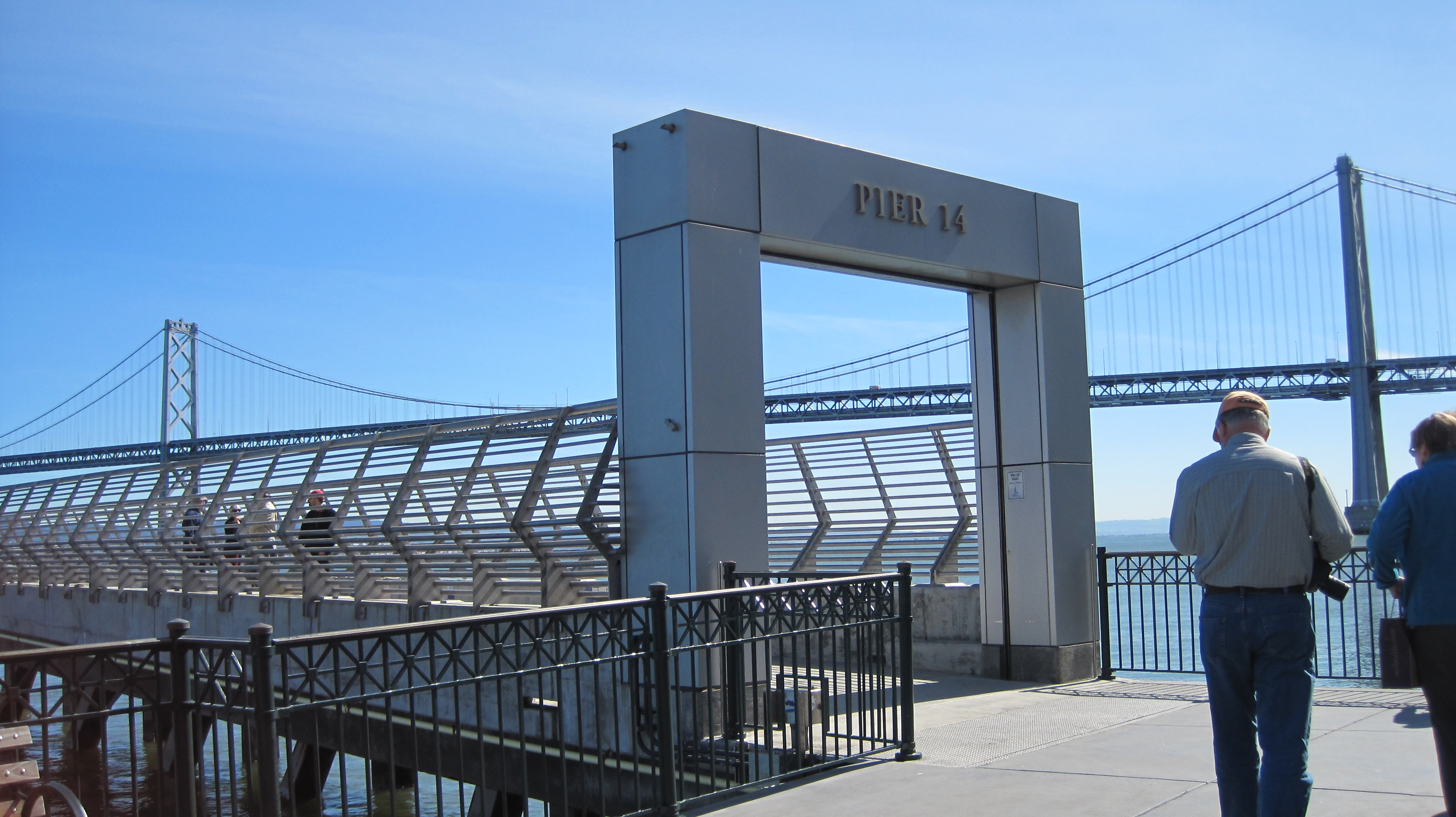 Pier 14 in San Francisco, California.